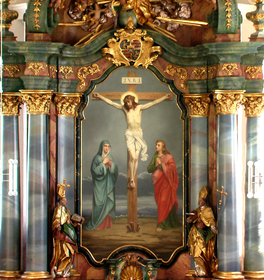 St. Georg Auernheim - Hochaltar, Gemälde: "Jesus am Kreuz mit Maria und Johannes"